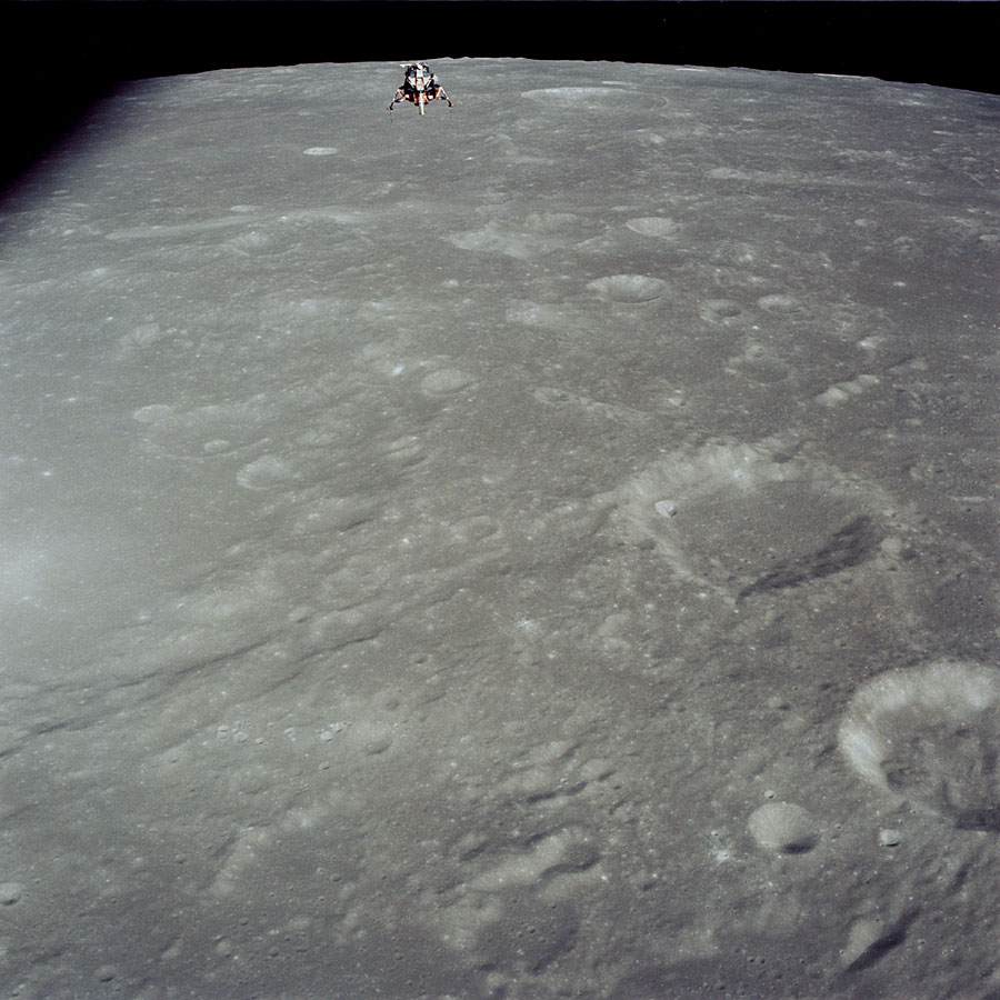 Apollo 12 - NASA-foto dus publiek domein